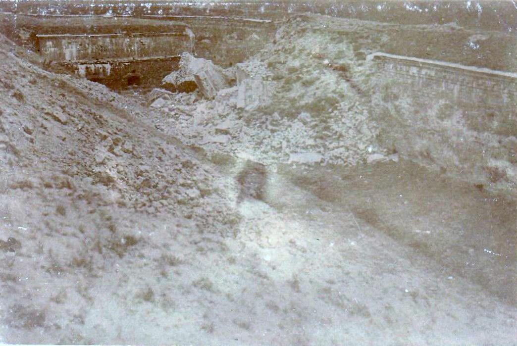 Kauno tvirtovės I fortas, vokiečių haubicos sviedinio pataikymo vietoje.